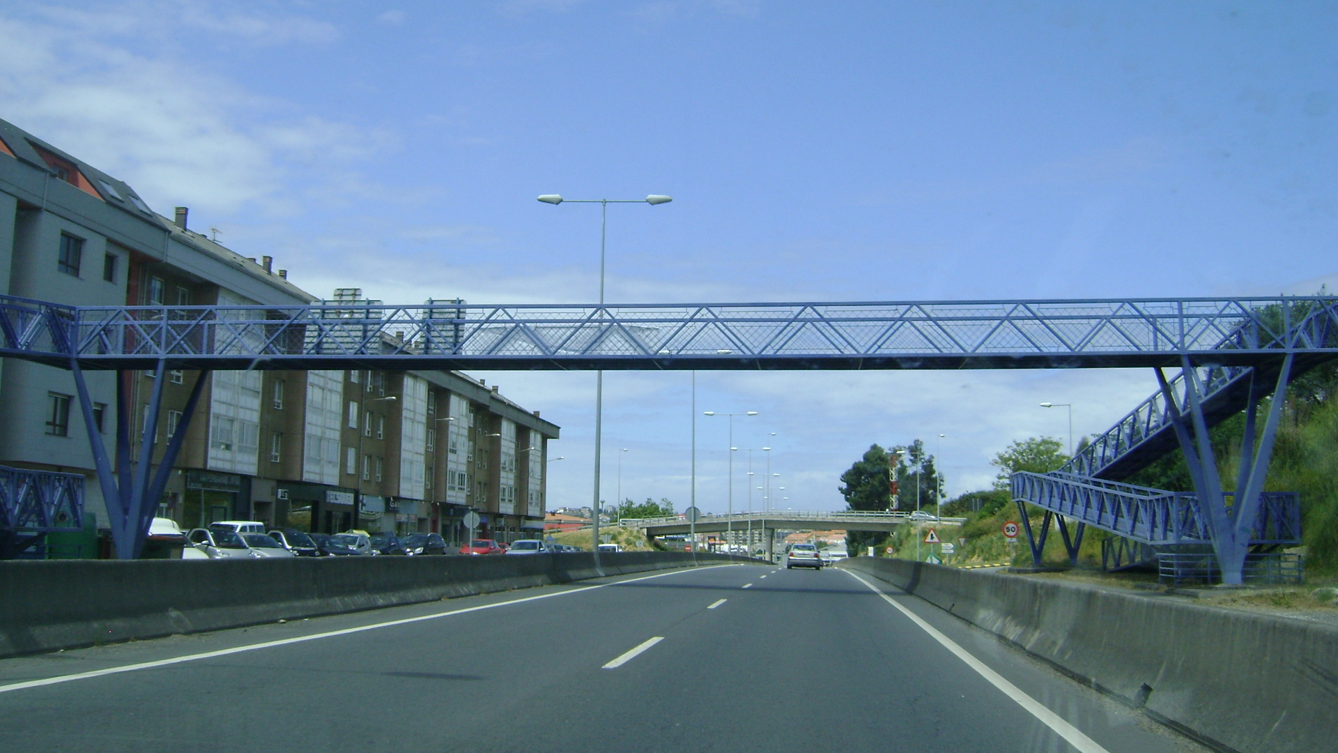 El Temple, Cambre, La Coruña